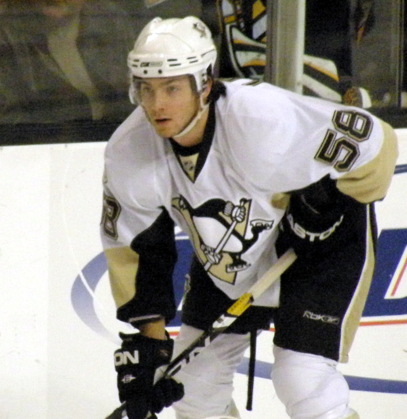 #58 Kris Letang (D)